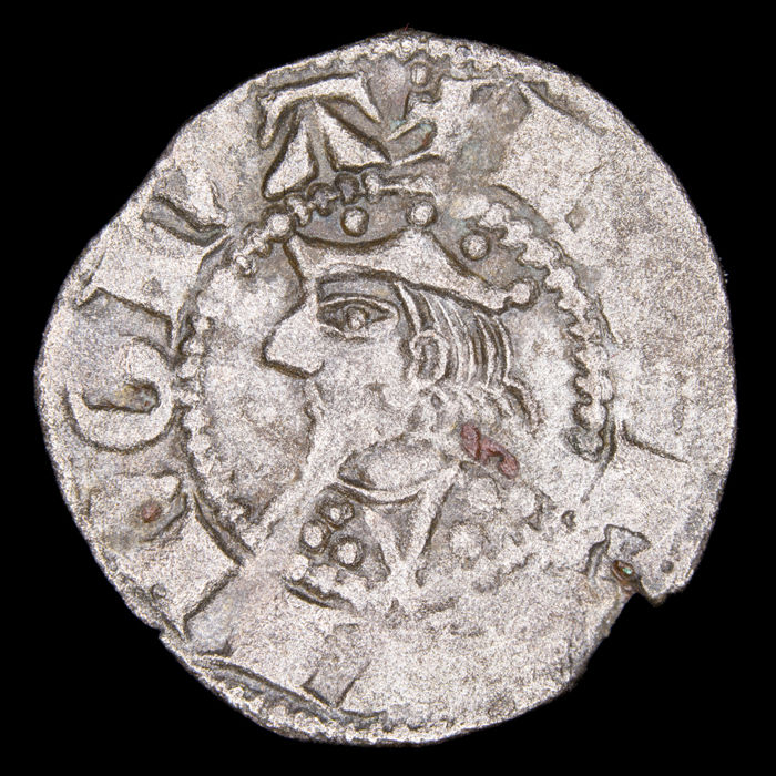 Na fotografiji je prednja stran kovanca, na kateri je upodobljen Jakob II. Aragonski.